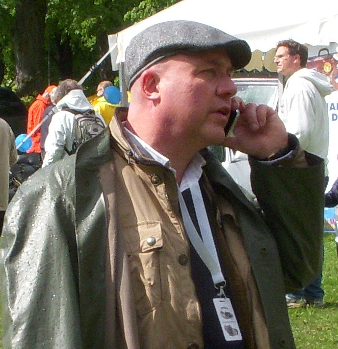 Journalisten och programledaren Anders Hildemar Olsson (på Gärdesloppet 2011)